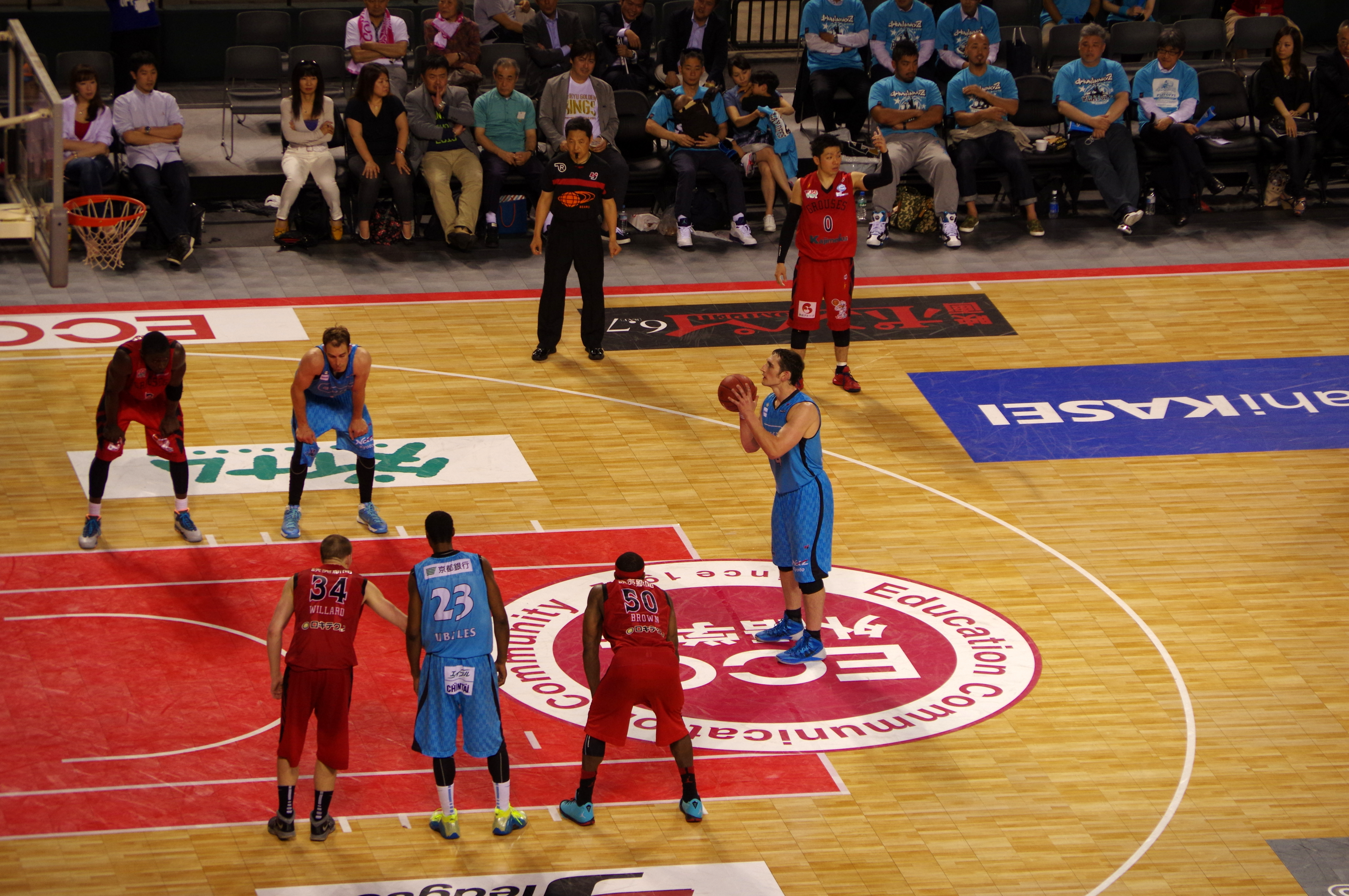 ｂｊリーグ 2013-2014シーズン プレイオフ ファイナルズ_013